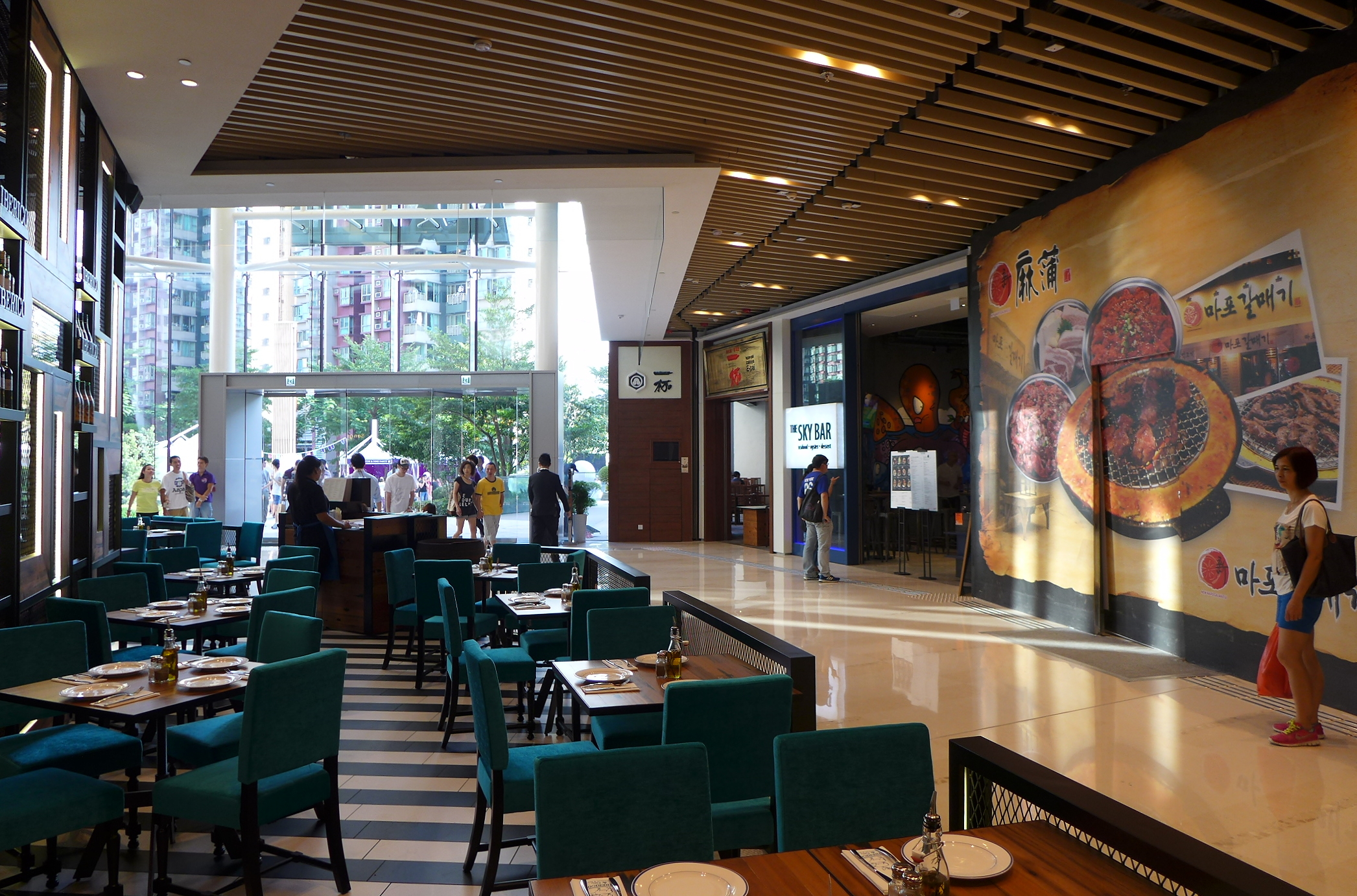 YOHO Mall GF Restaurants